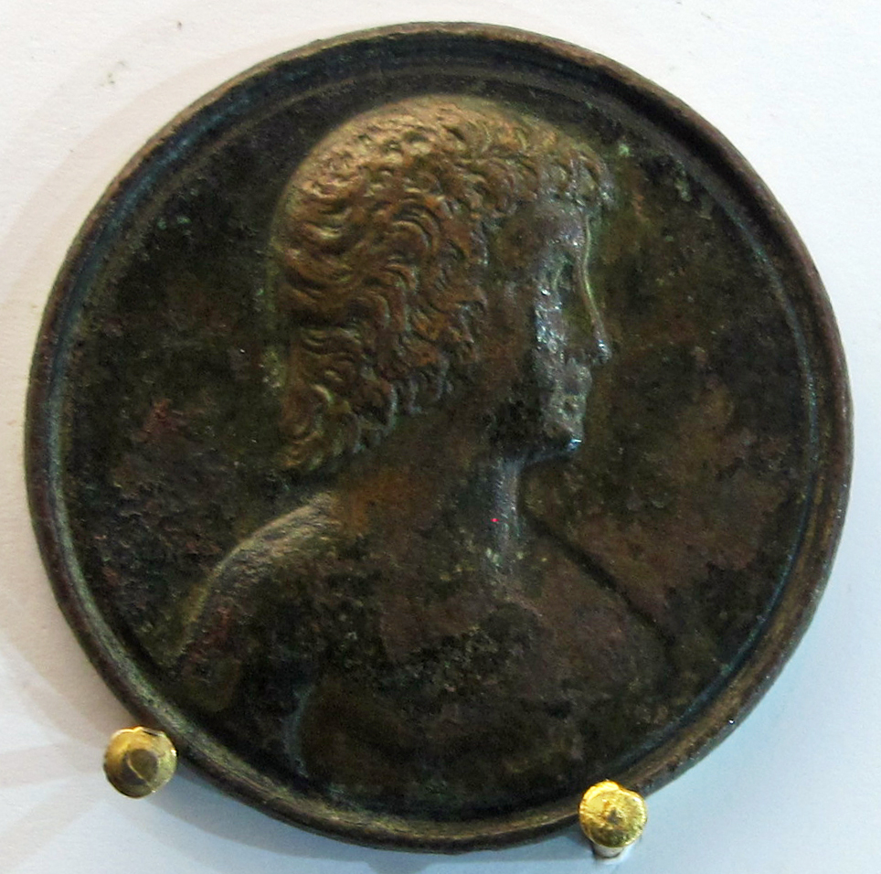 Medaglione contorniato di antinoo